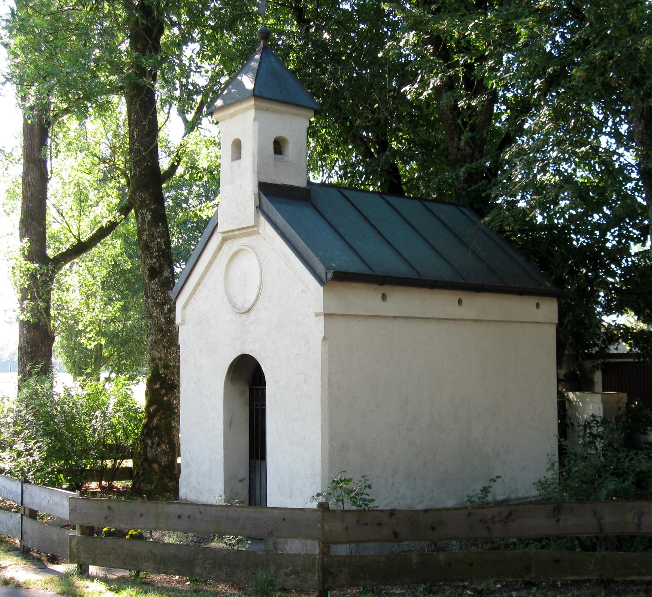 Keferloh; St. Maria, Kapelle, bezeichnet mit dem Jahr 1872.